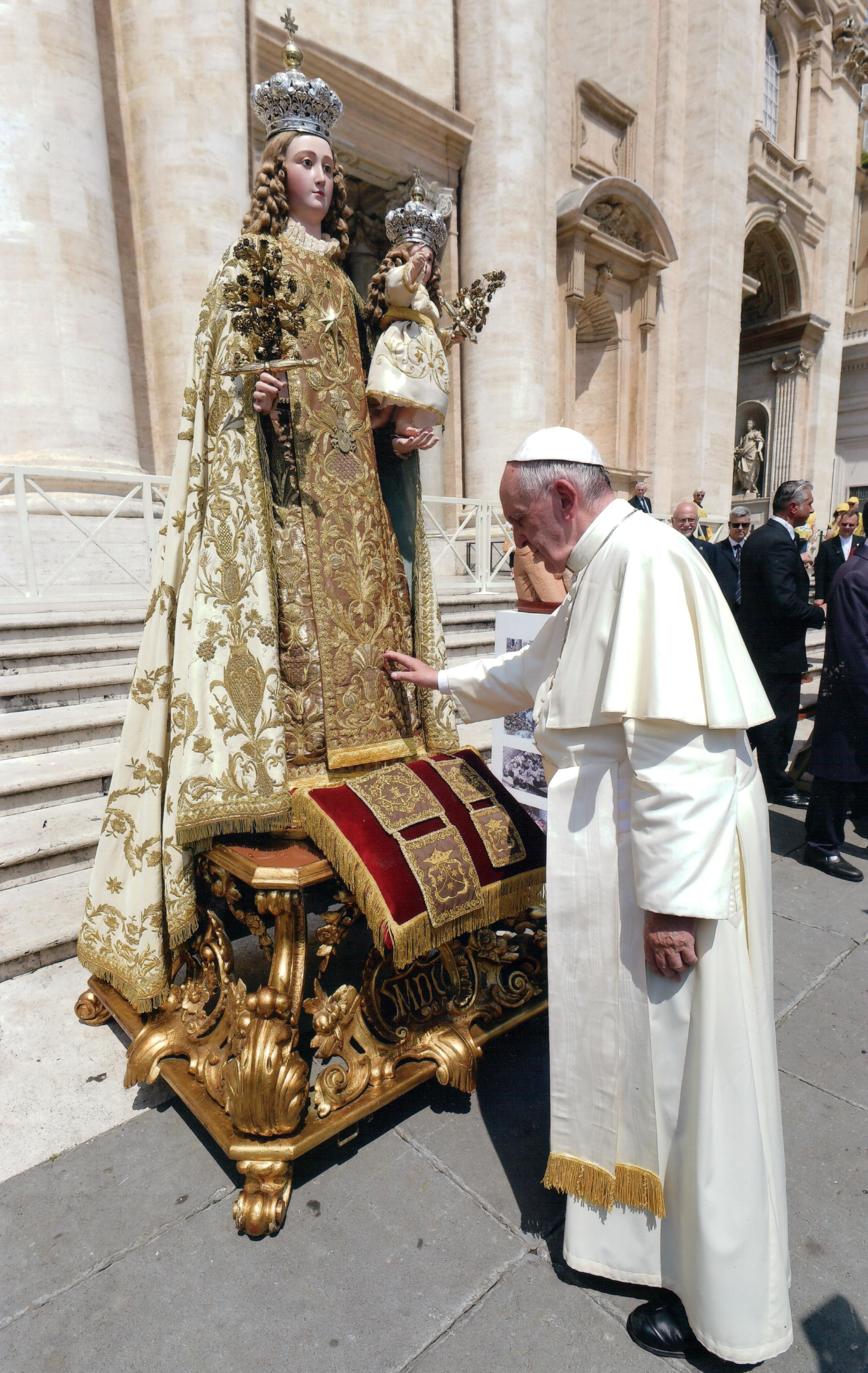 Papa Francesco e la Madonna del Carmine di Mottola